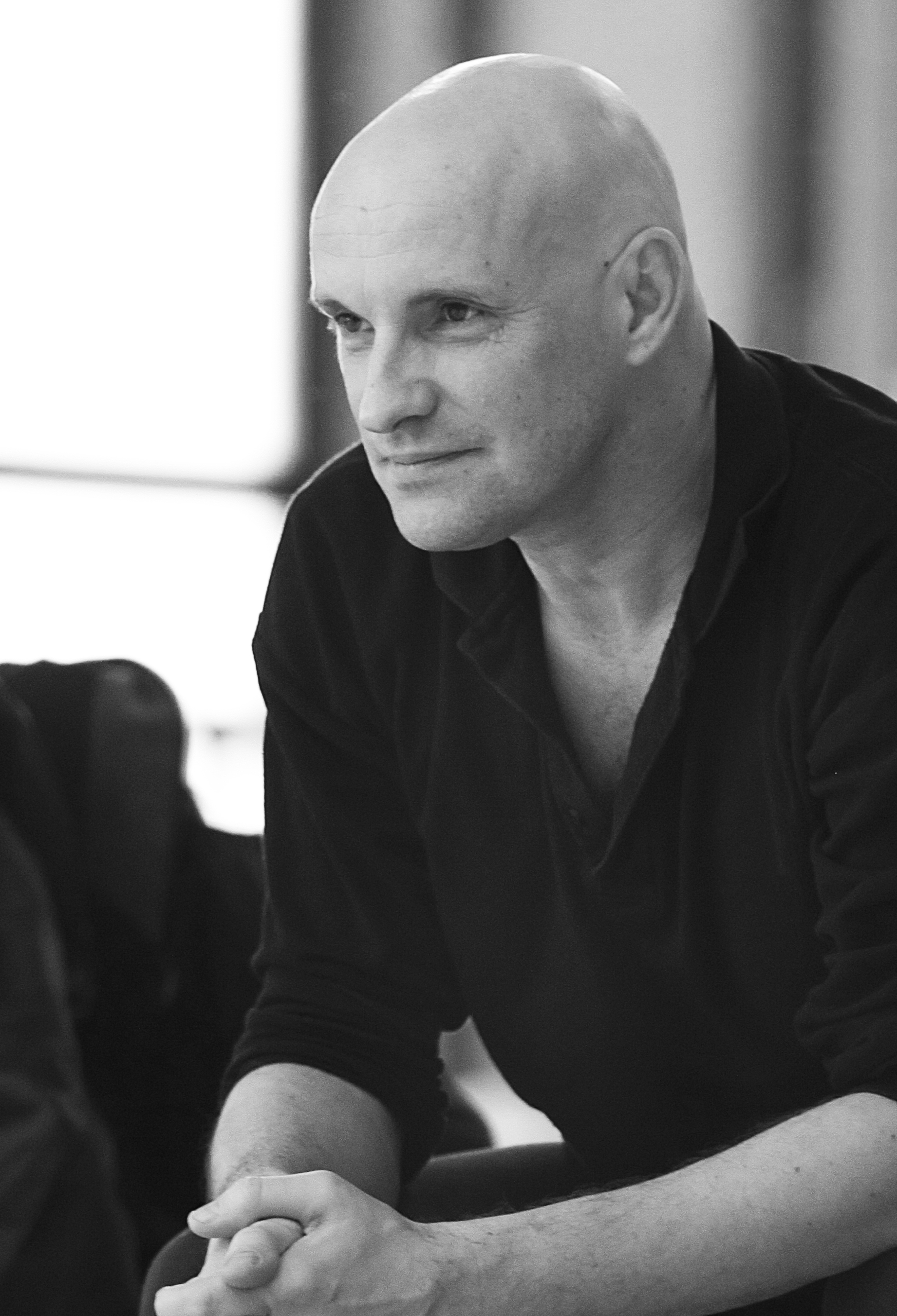 Portrait de Jean-Christophe Maillot - photo de Marie-Laure Briane